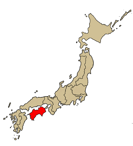 Mappa della diocesi cattolica di Takamatsu, in Giappone. Lavoro personale.